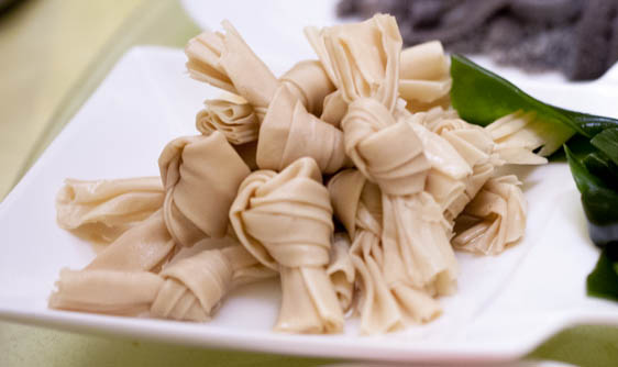 Nan Men Hotpot (南门涮肉)